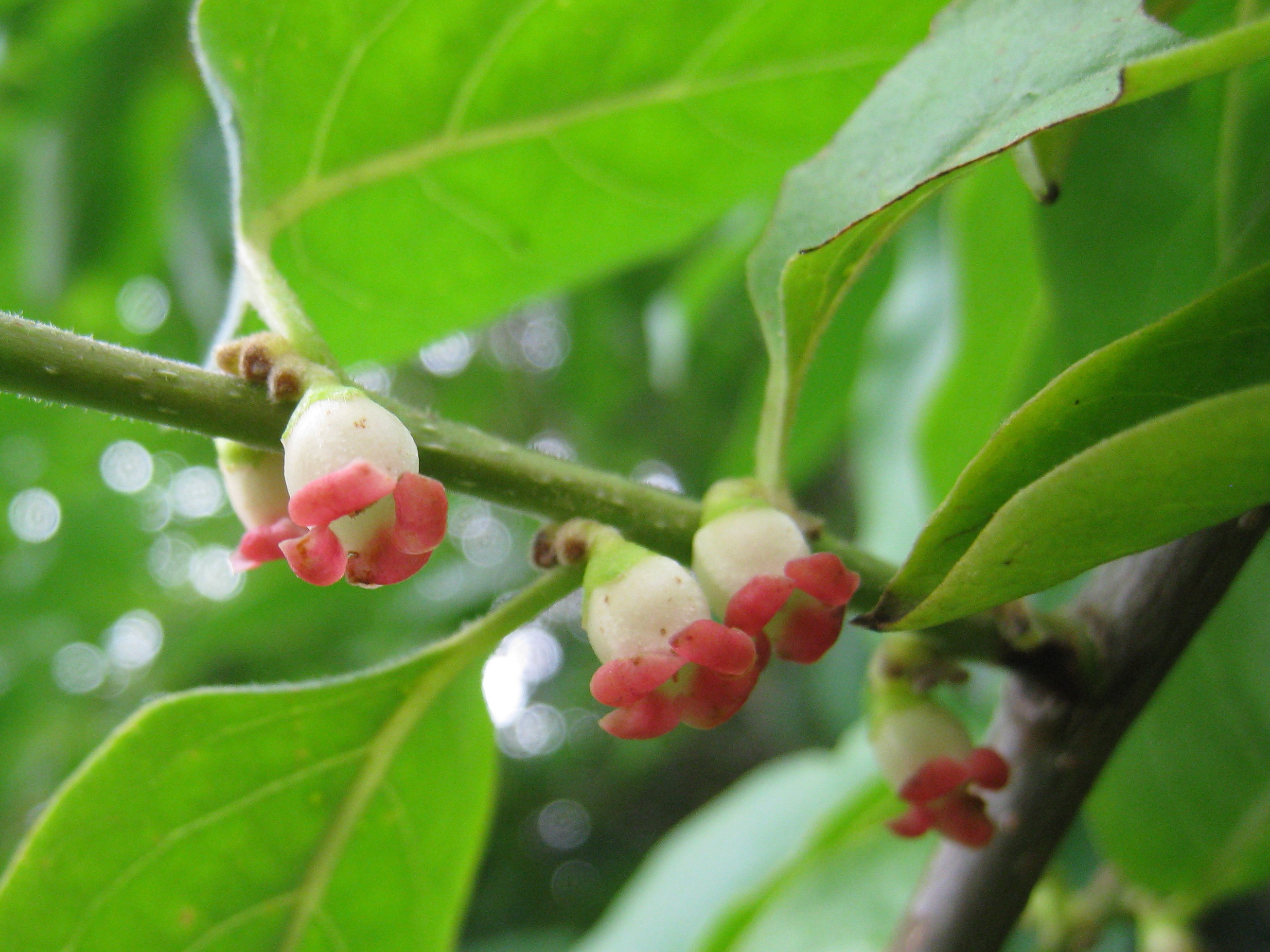 Diospyros lotus, fleur male